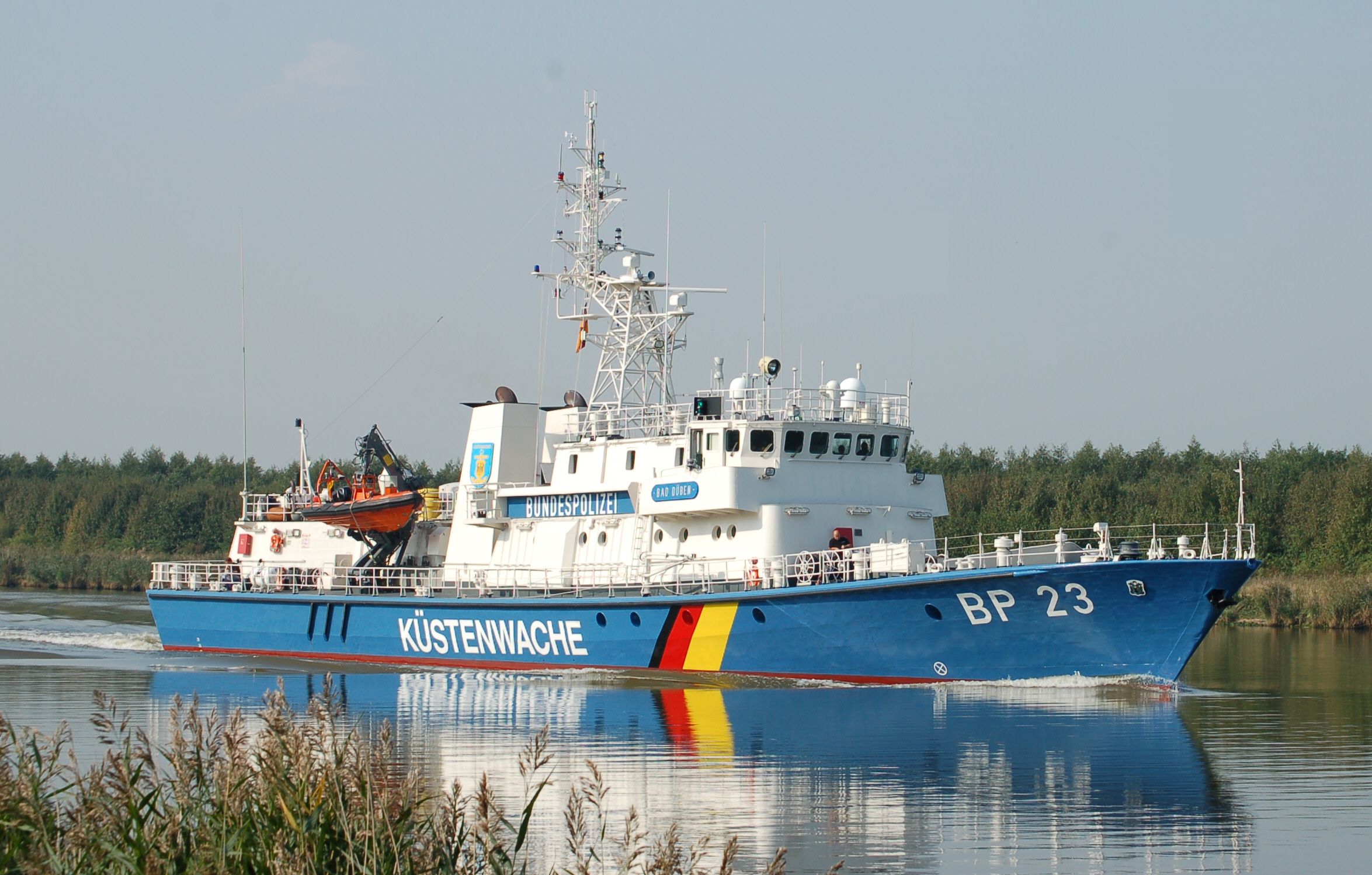 Küstenwachschiff "Bad Düben" aif dem Nord-Ostsee-Kanal